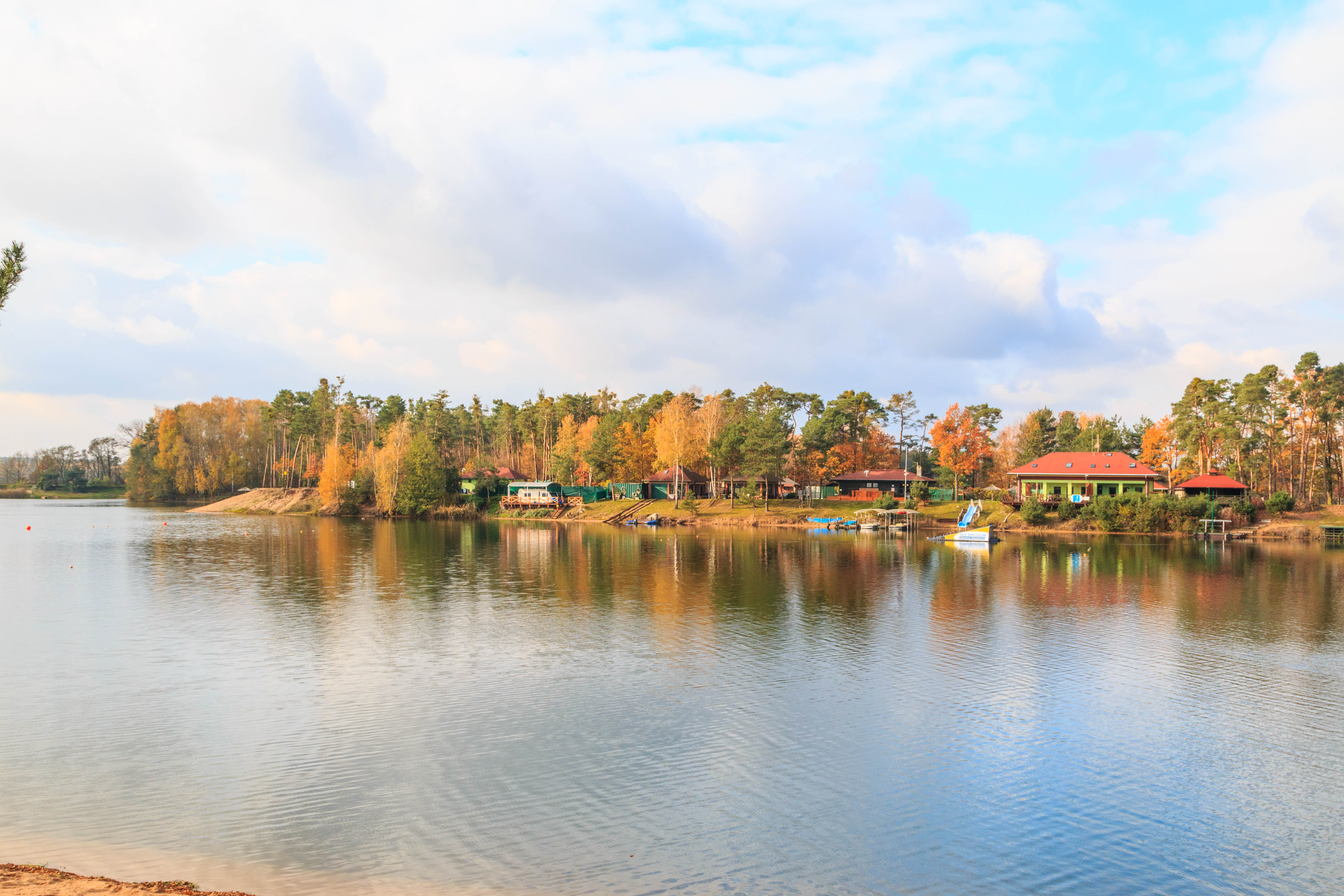 Mělické písníky Project: Vodstvo